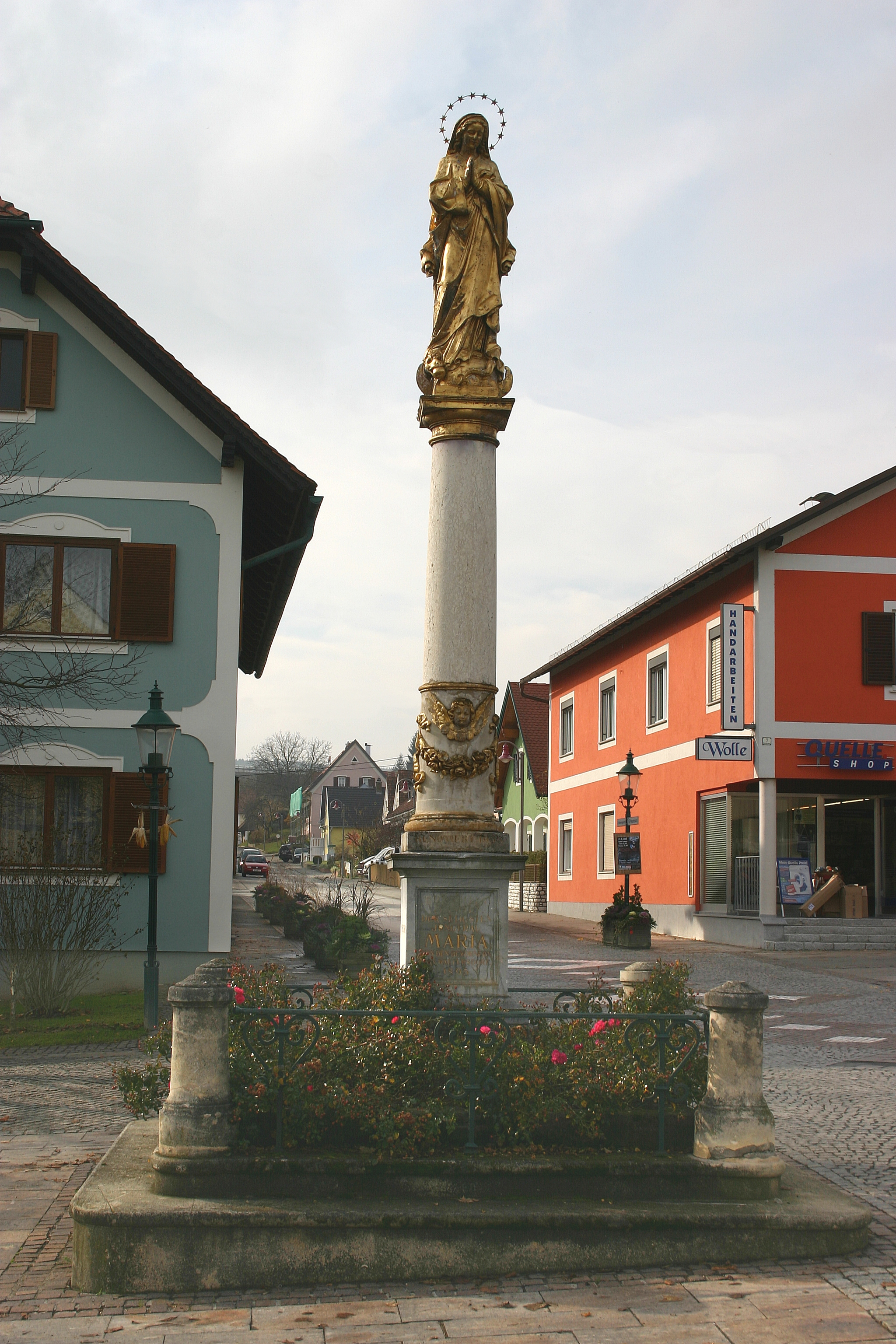 Bad Waltersdorf, Mariensäule